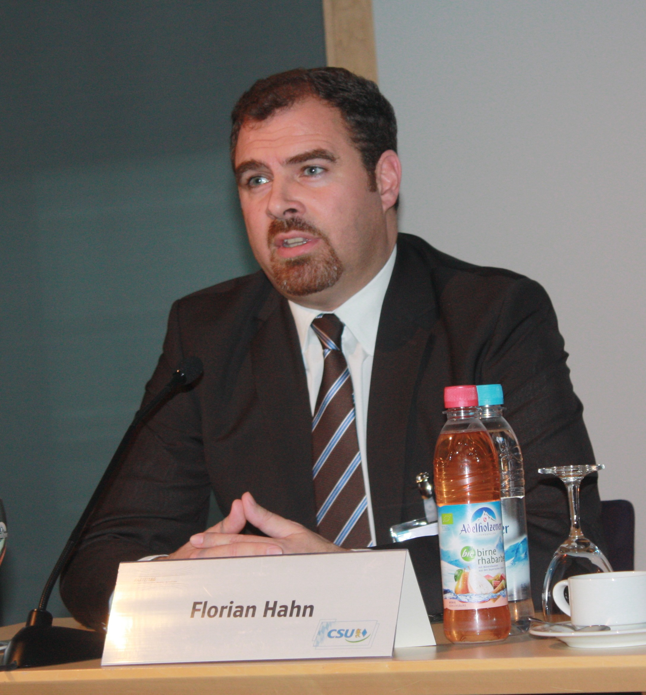 Florian Hahn auf dem CSU-Parteitag am 12. Dezember 2014 in Nürnberg